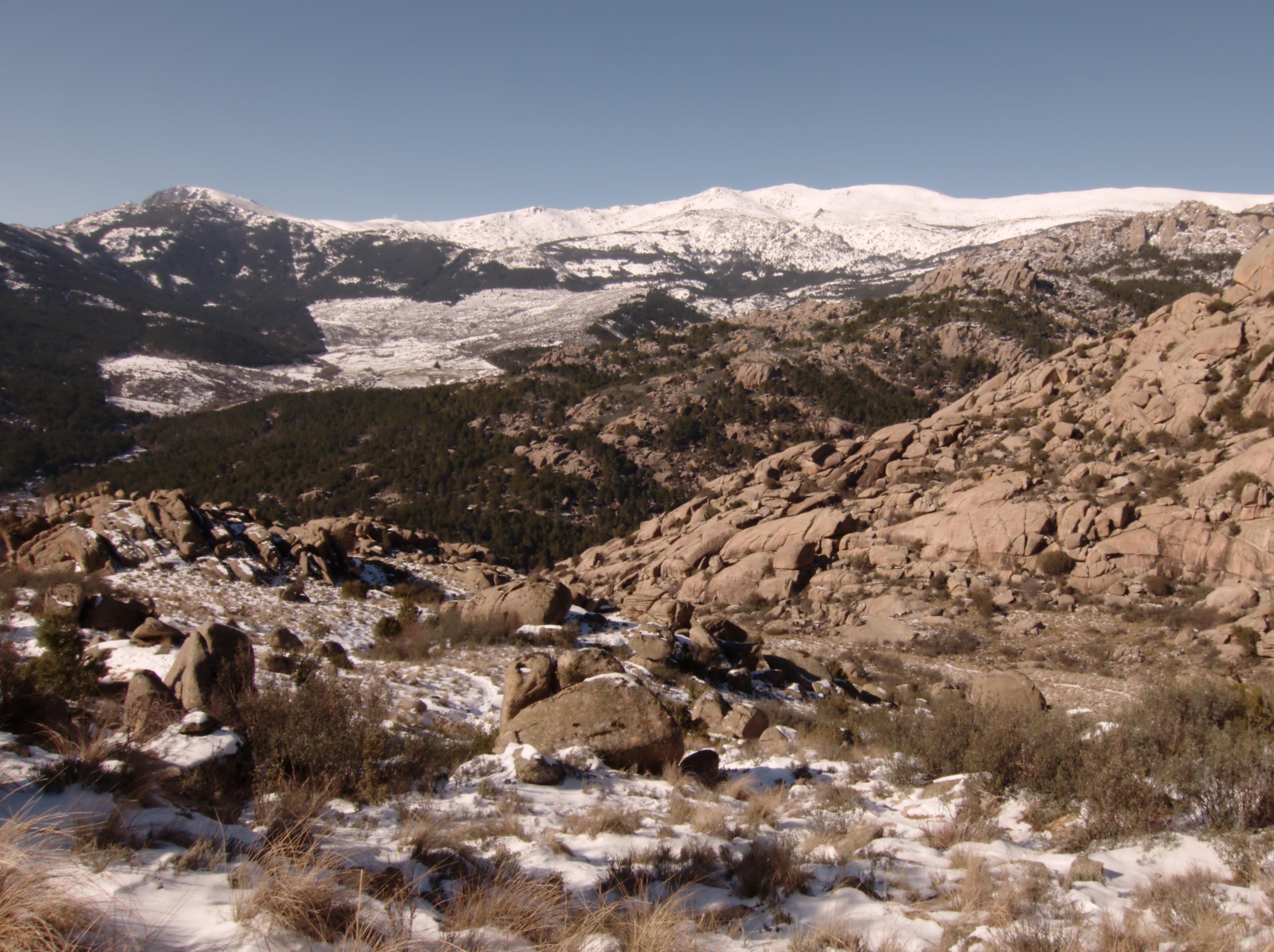 La Pedriza